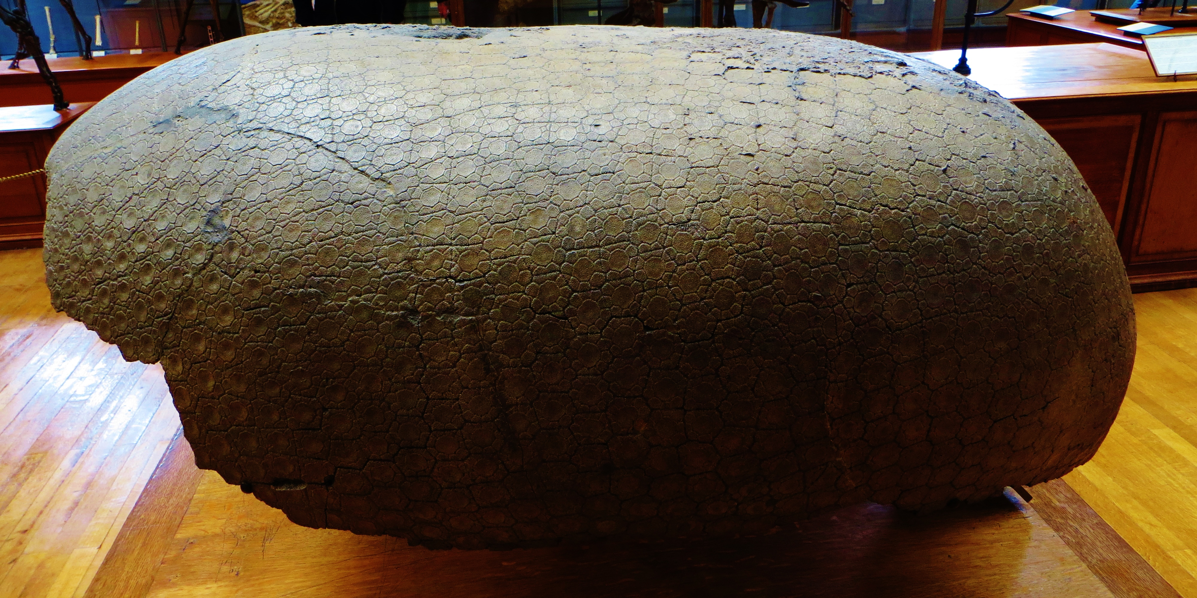 Fossil of Sclerocalyptus, an extinct mammal - Took the photo at Musee d'Histoire Naturelle, Paris